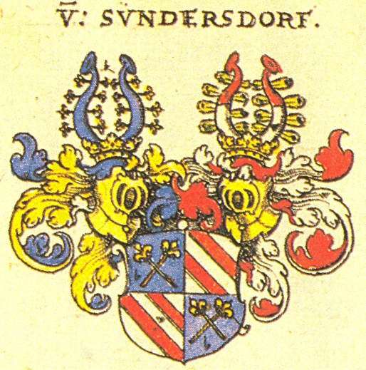 Wappen von Sundersdorf (Adelsgeschlecht), nach Siebmacher